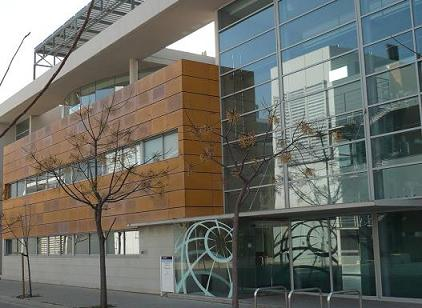 Seu de l'Institut de Geomàtica a Castelldefels.